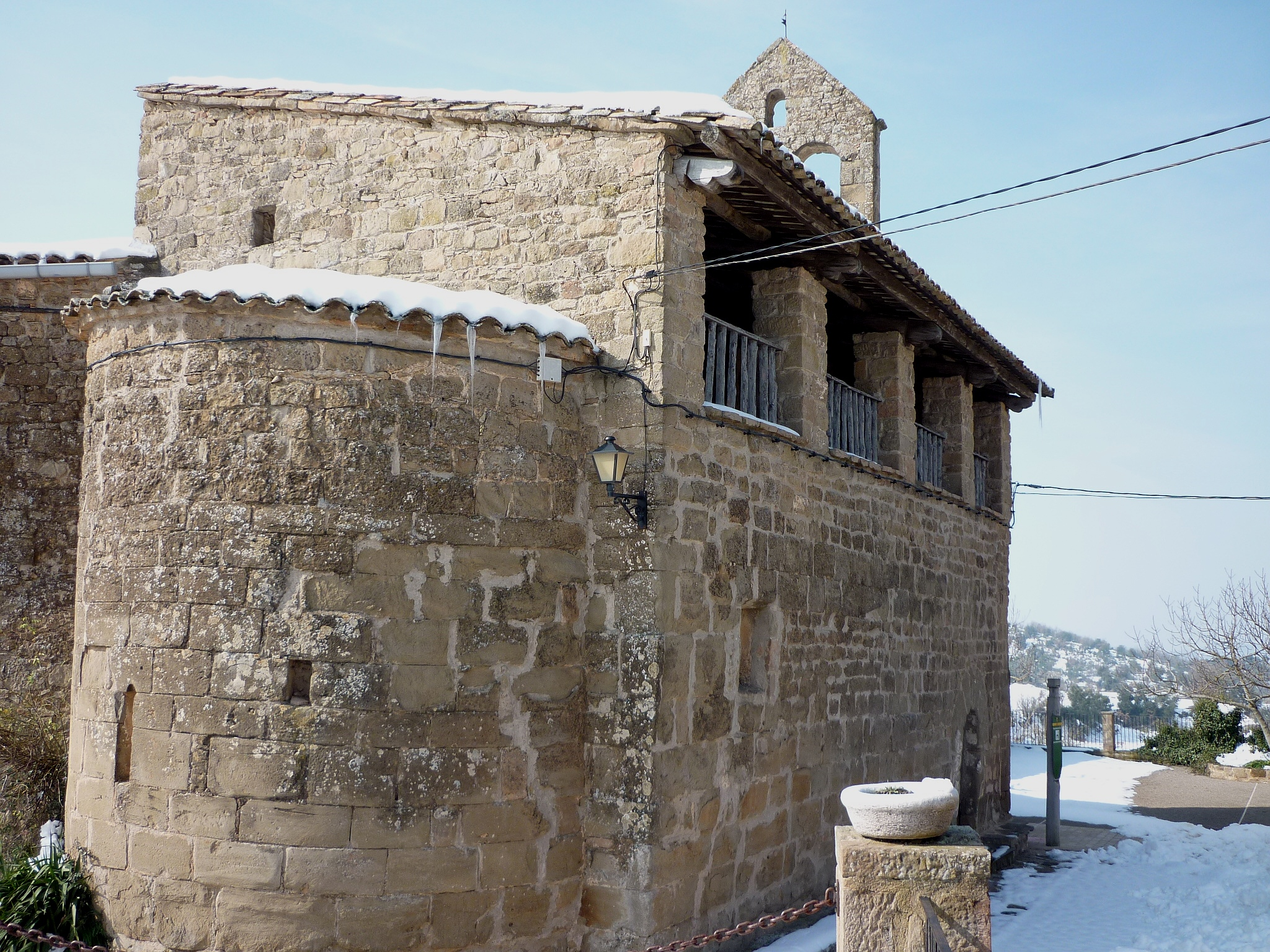 Esglèsia de Santa María al nucli de Claret, municipi de Torà